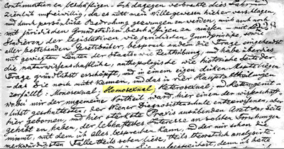 Erste Nennung des Wortes "homosexual" und "heterosexual" (in einem Brief des österreichisch-ungarischen Schriftstellers/von) Karl Maria Kertbeny im Jahr 1868 Foto: Ungarische Nationalbibliothek; Quelle